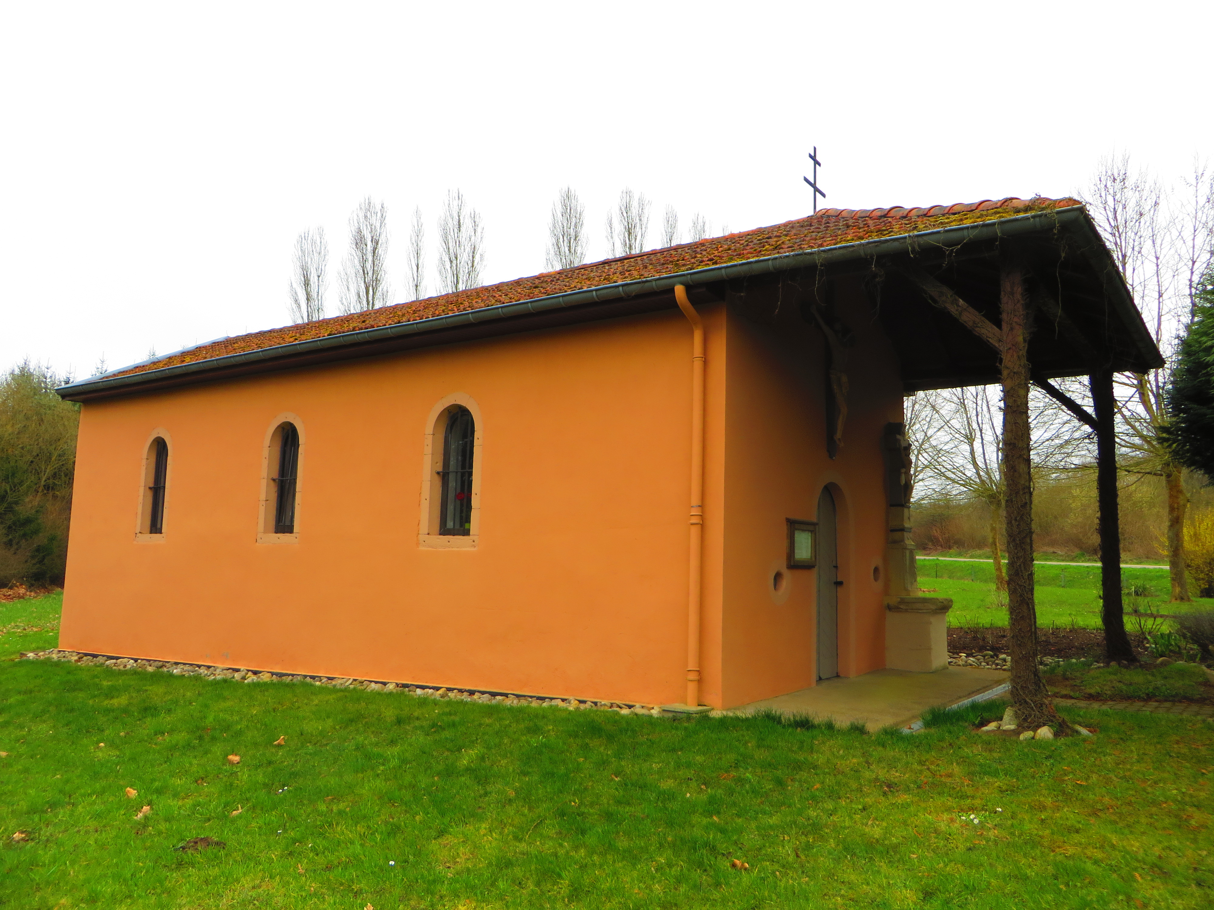 Viller 57 chapelle